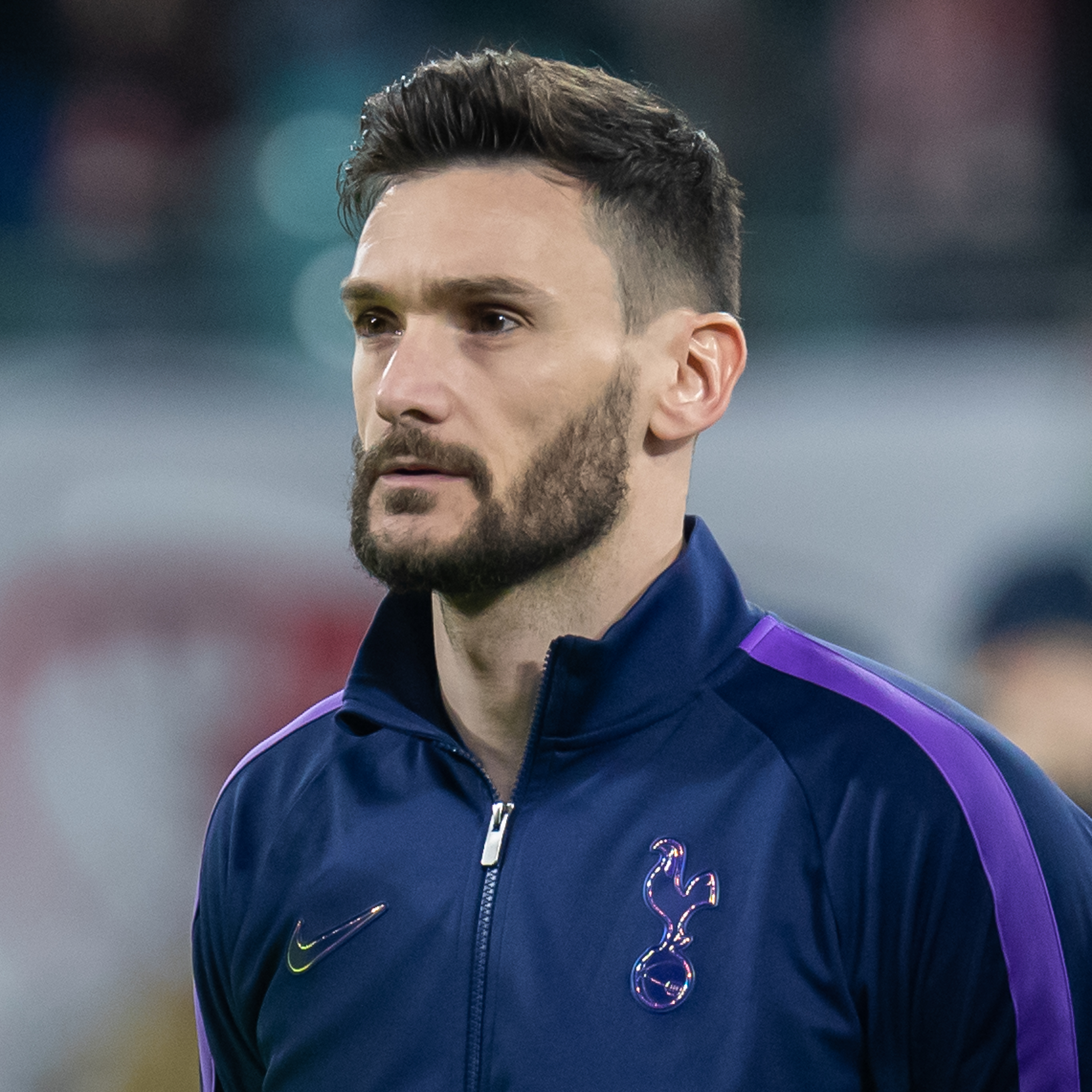 Fußball, Männer, UEFA Champions League Achtelfinale, RB Leipzig - Tottenham Hotspur; Hugo Lloris (Tottenham Hotspur, 1, Torwart, goalkeeper)